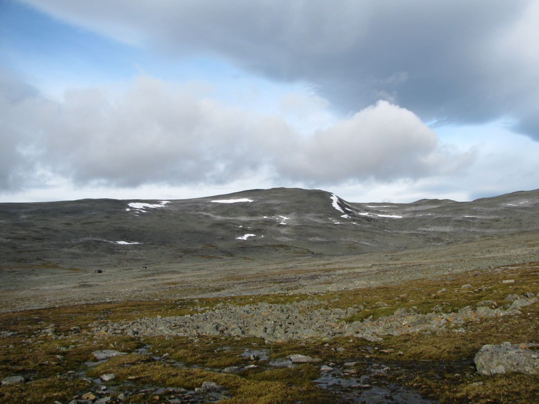 Kiedditsohkka Ritnitsohkkan alarinteeltä kuvattuna, Halti kohoaa kuvan oikean reunassa.